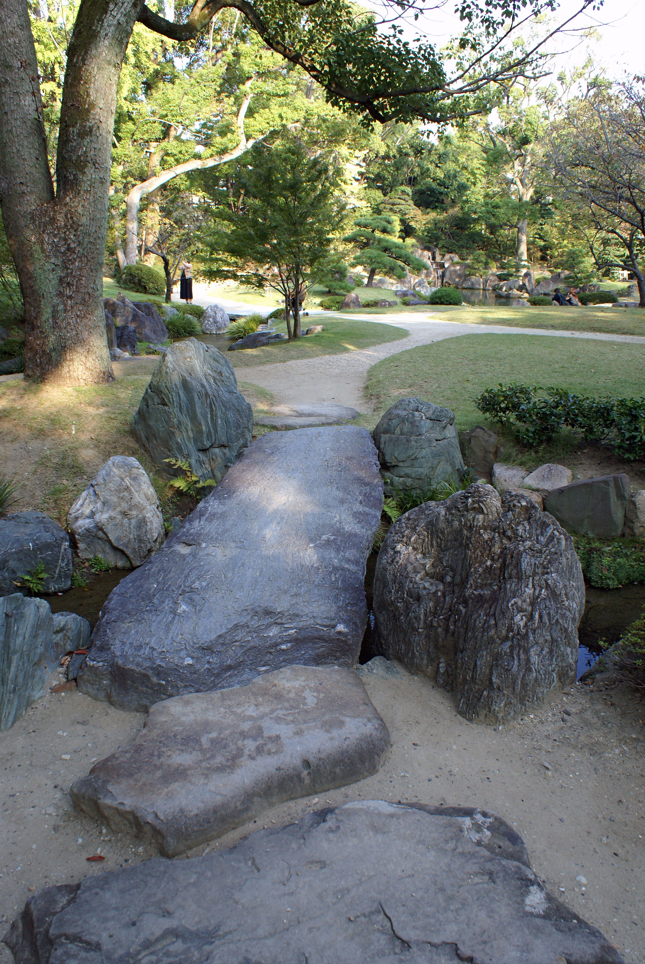 Shitennō-ji Honbo Garden in Osaka, Japan